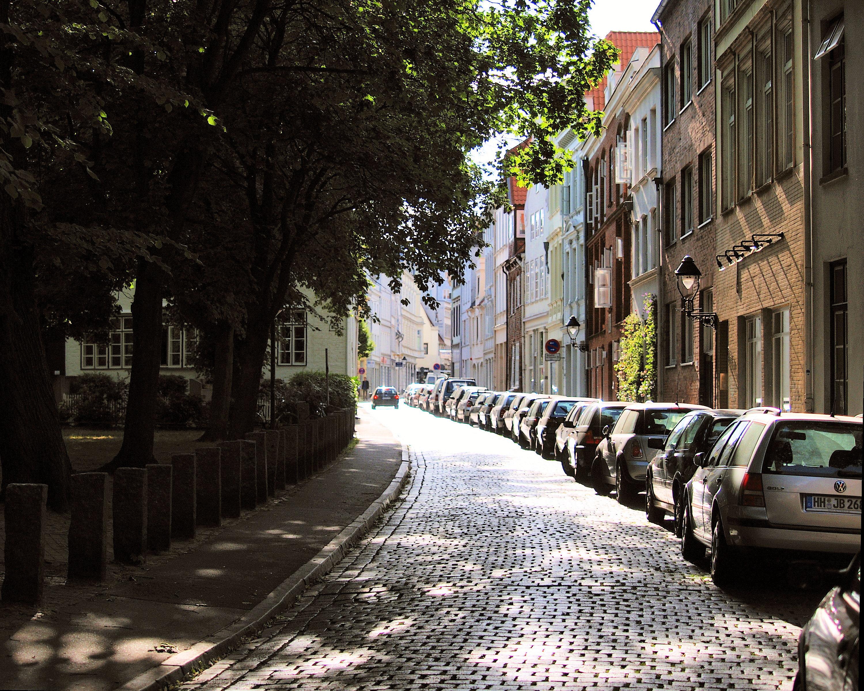 Die Aegidienstraße in Lübeck, von der Aegidienkirche aus gesehen